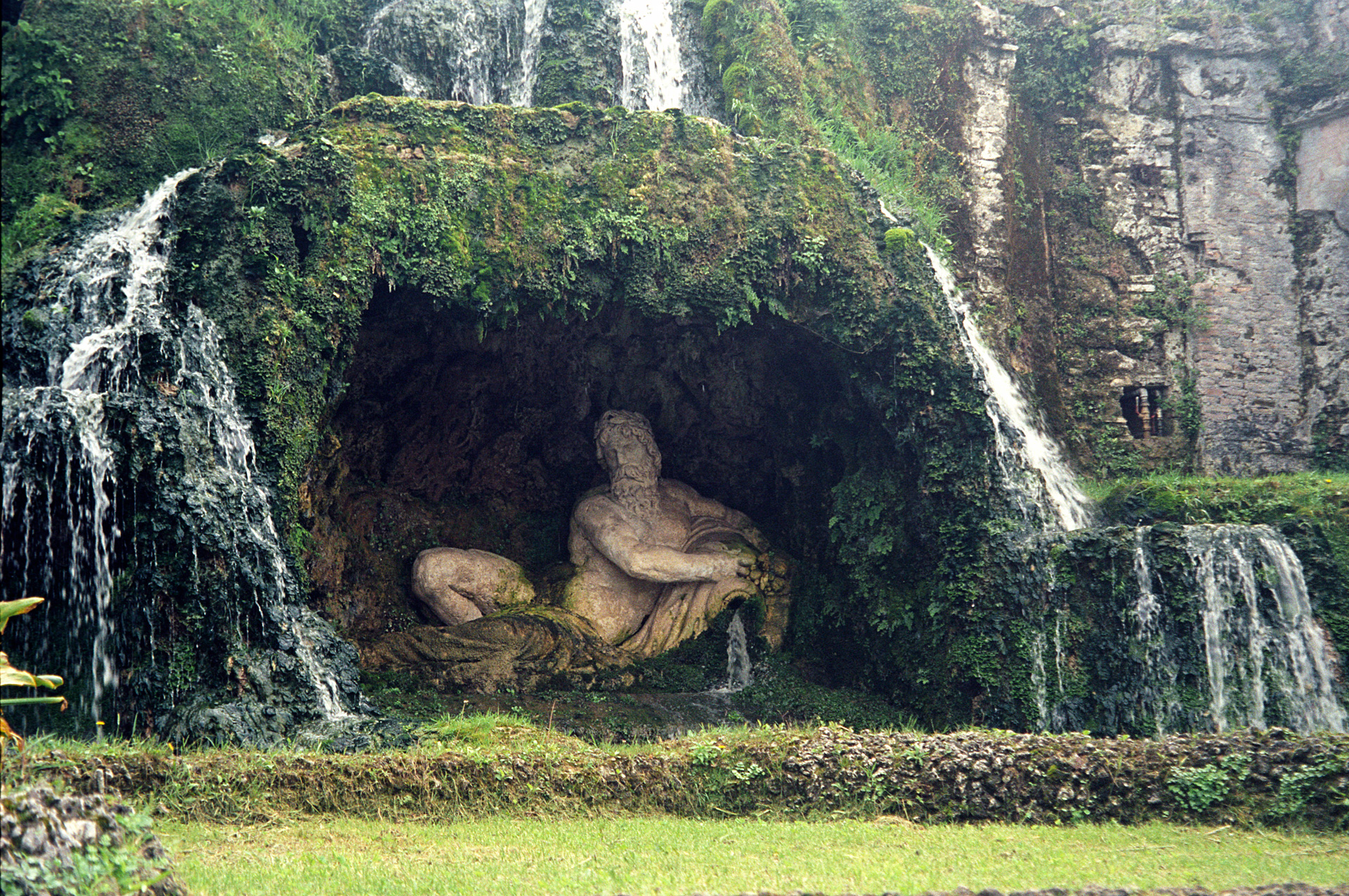 Villa d'Este, Tivoli - Allegoria del fiume Aniene che si congiunge al Tevere sotto la Rometta.